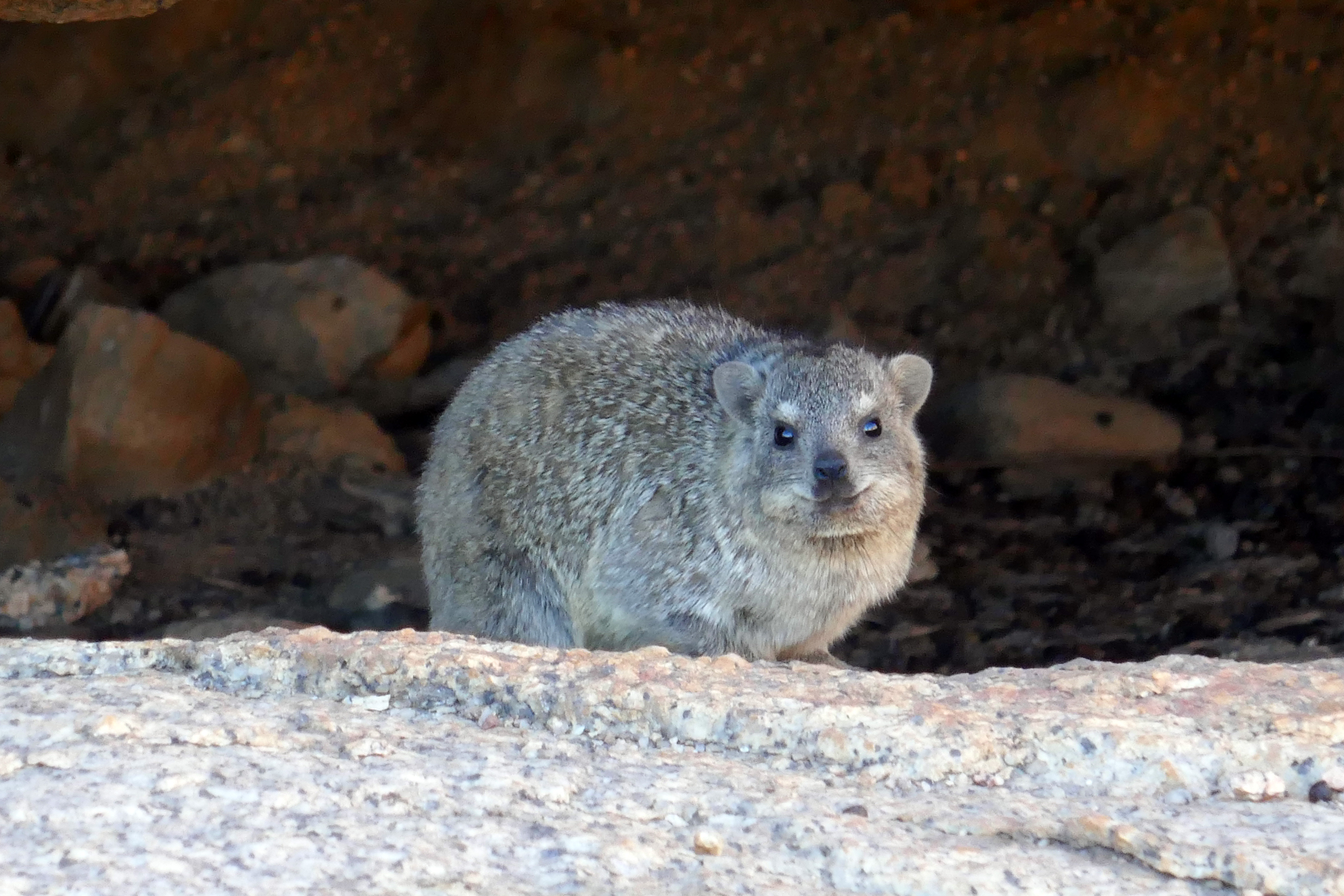 Rock dassie (ou Procavia capensis) à Spitzkoppe (Namibie).